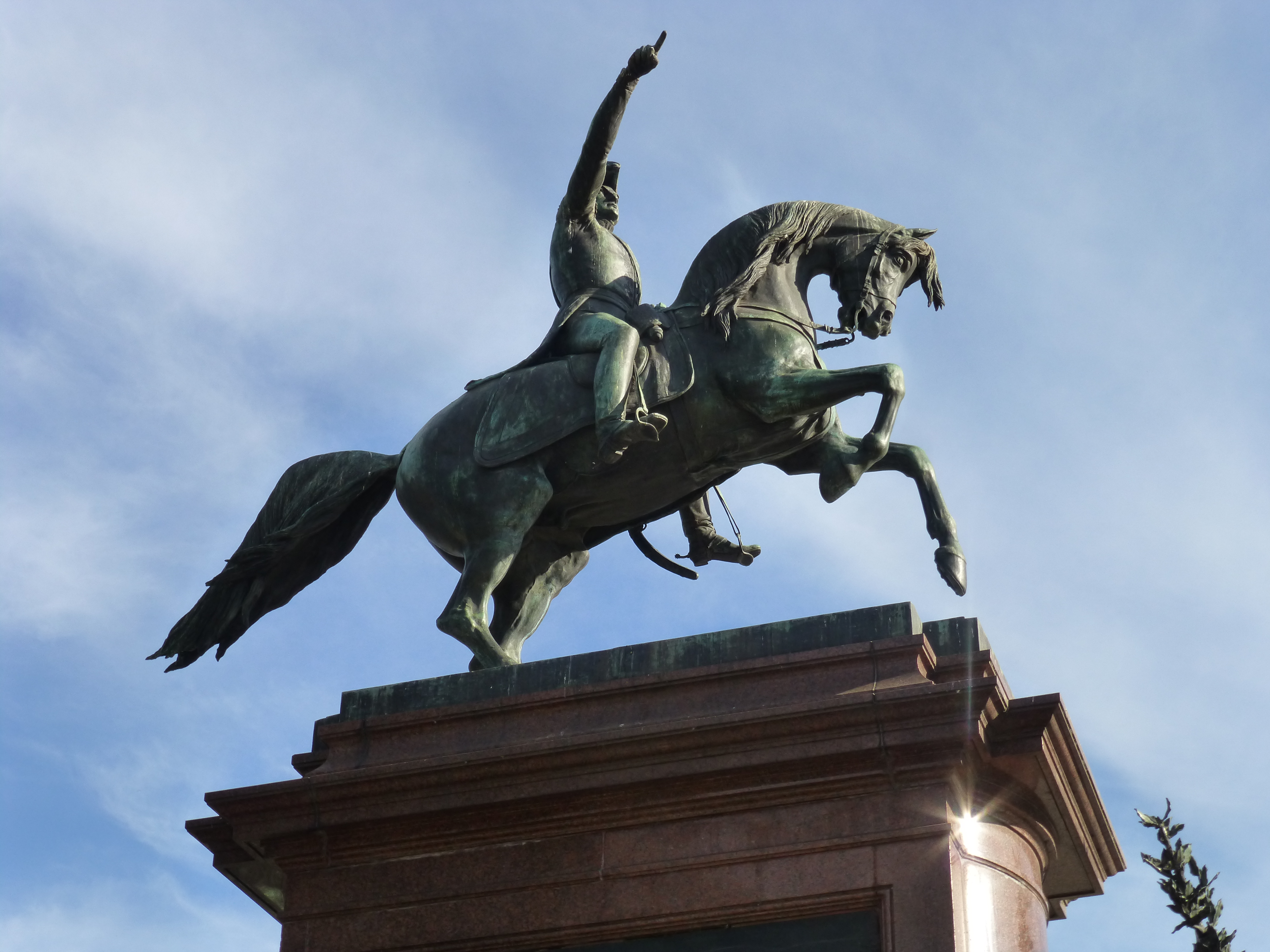 Plaza San Martín